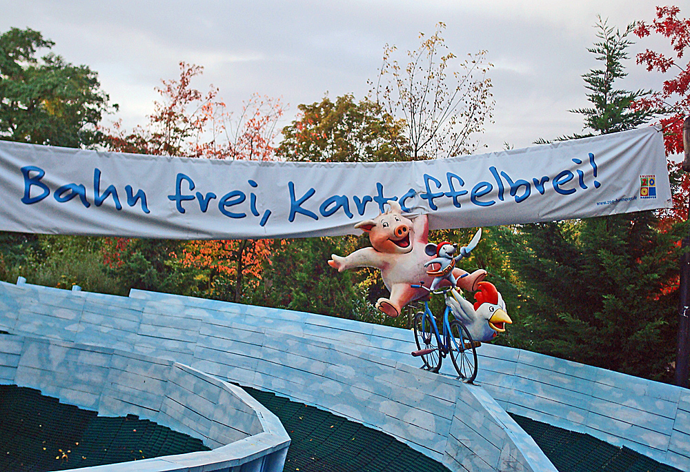 Rodelbahn im Zoo Hannover mit Motiven aus den Büchern "Freunde" und "Mullewapp" von Helme Heine